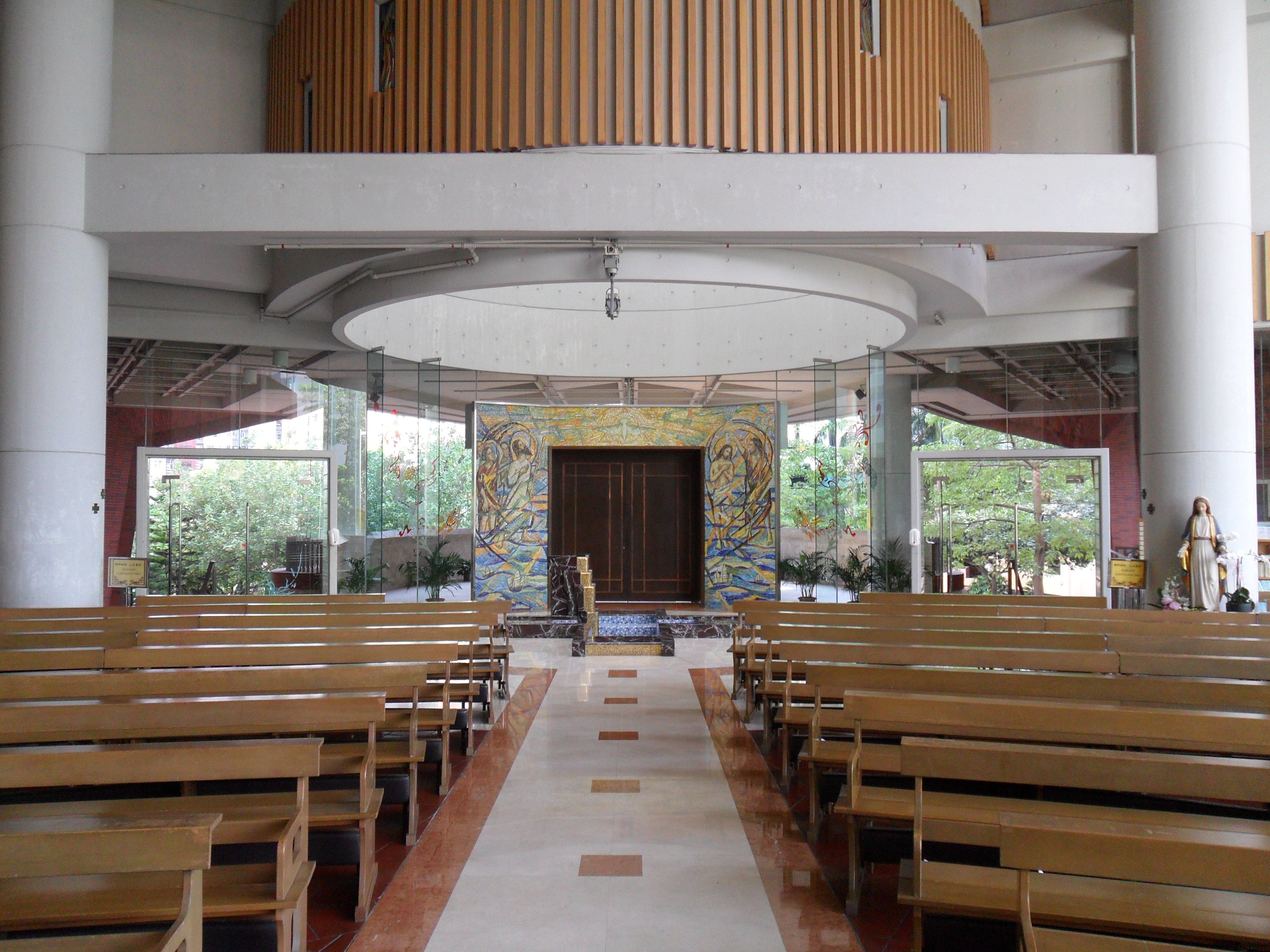 中文（香港）: 聖多默宗徒堂, 香港, 中國